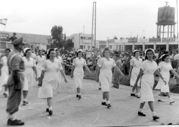 מצעד אחיות בכיכר העצמאות בעפולה ביום העצמאות בראשית תקופת המדינה